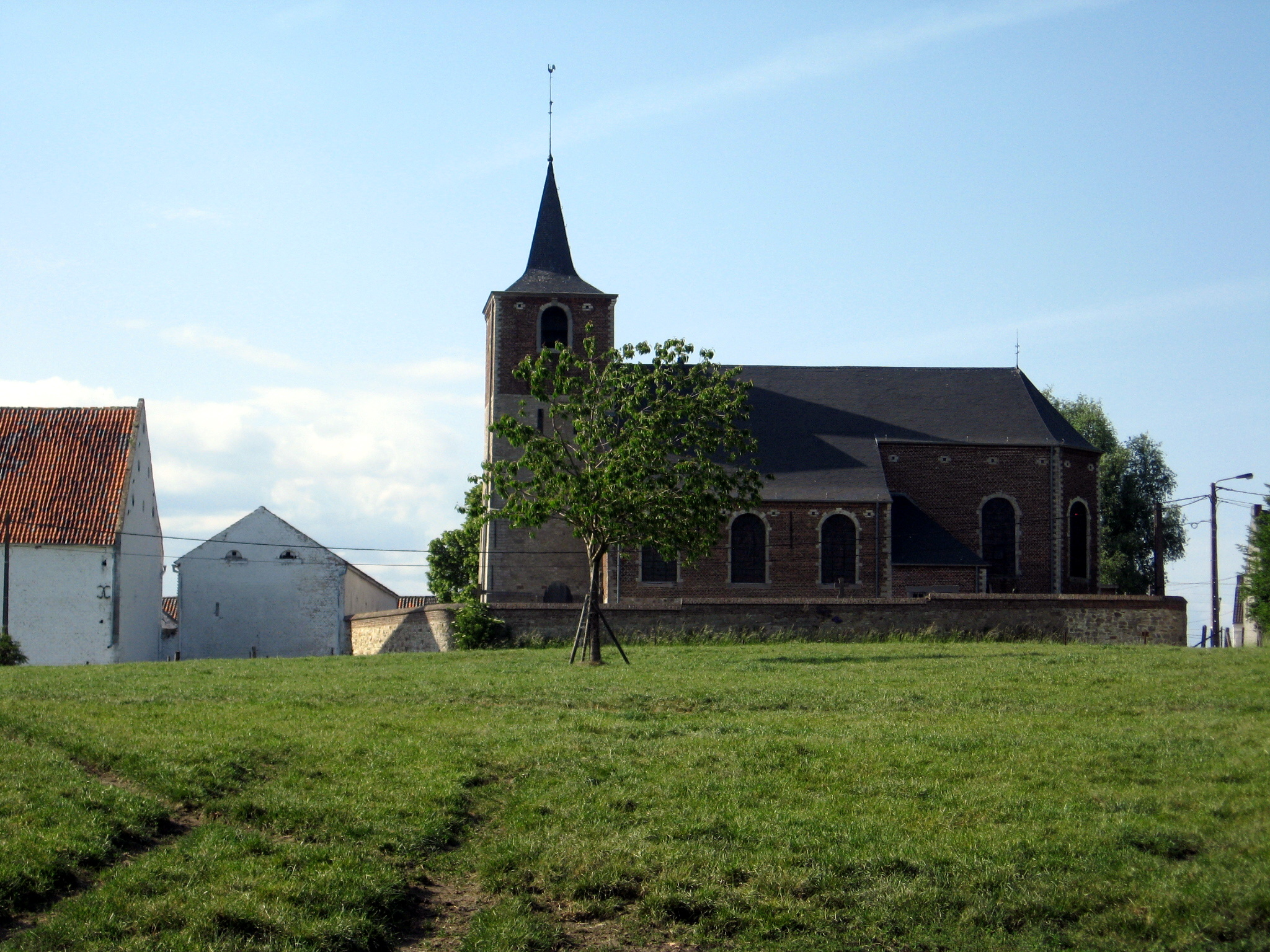 Onze-Lieve-Vrouw van de Rozenkranskerk in Bomal, Ramillies